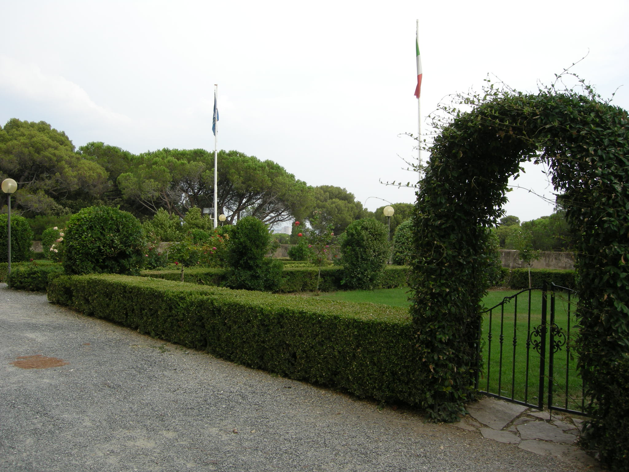 Castello pasquini, giardino